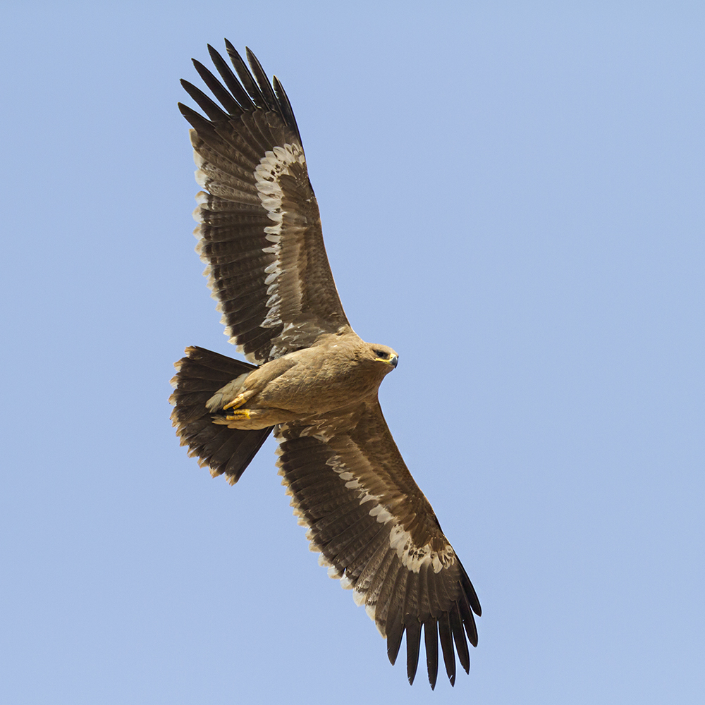 عقاب صحرای در حال پرواز (عقاب استپی)